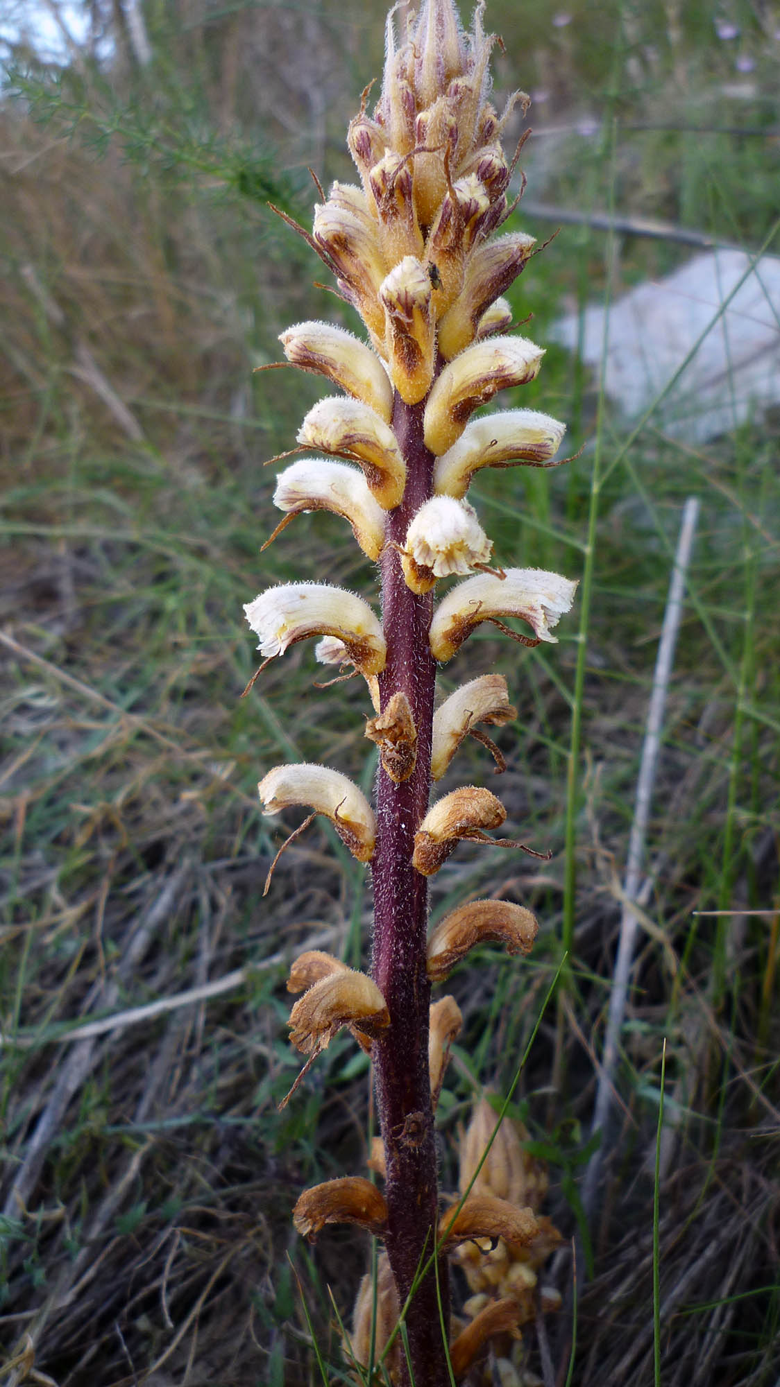 Orobanche ballotae en marzo en Tallante (Cartagena, España)